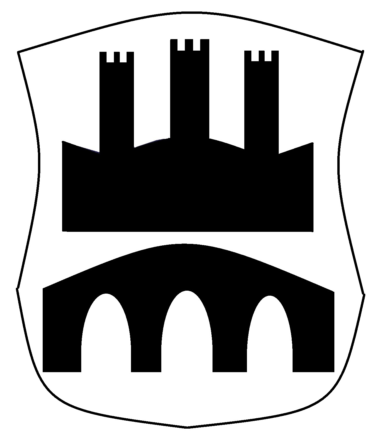 Escudo de armas de Iturgoyen.